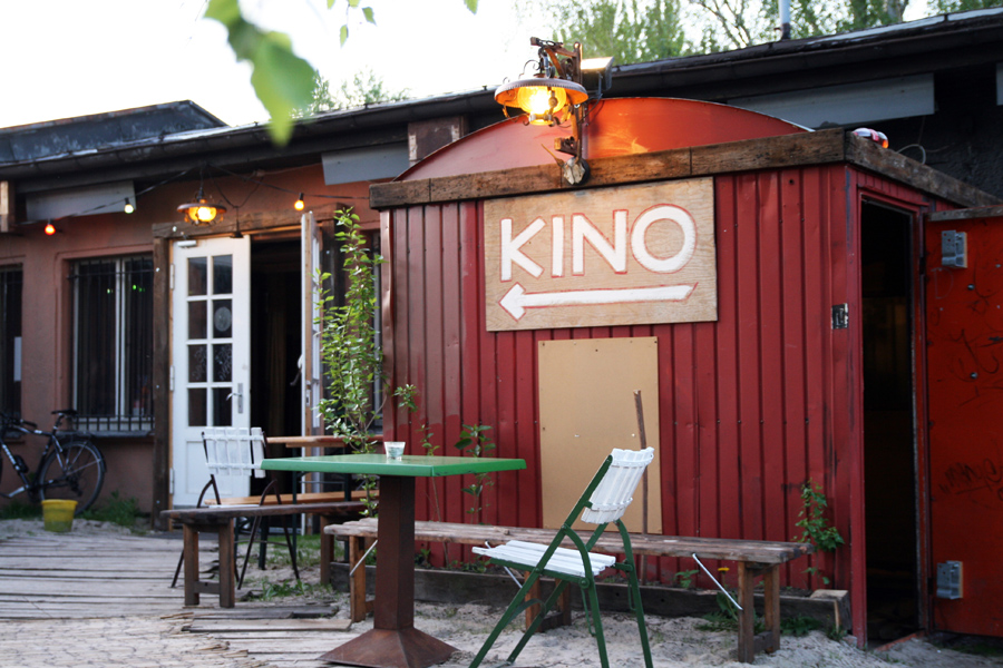 Eingang zum Kino Zukunft; mit Biergarten und Eingang zum Musikclub Tiefgrund